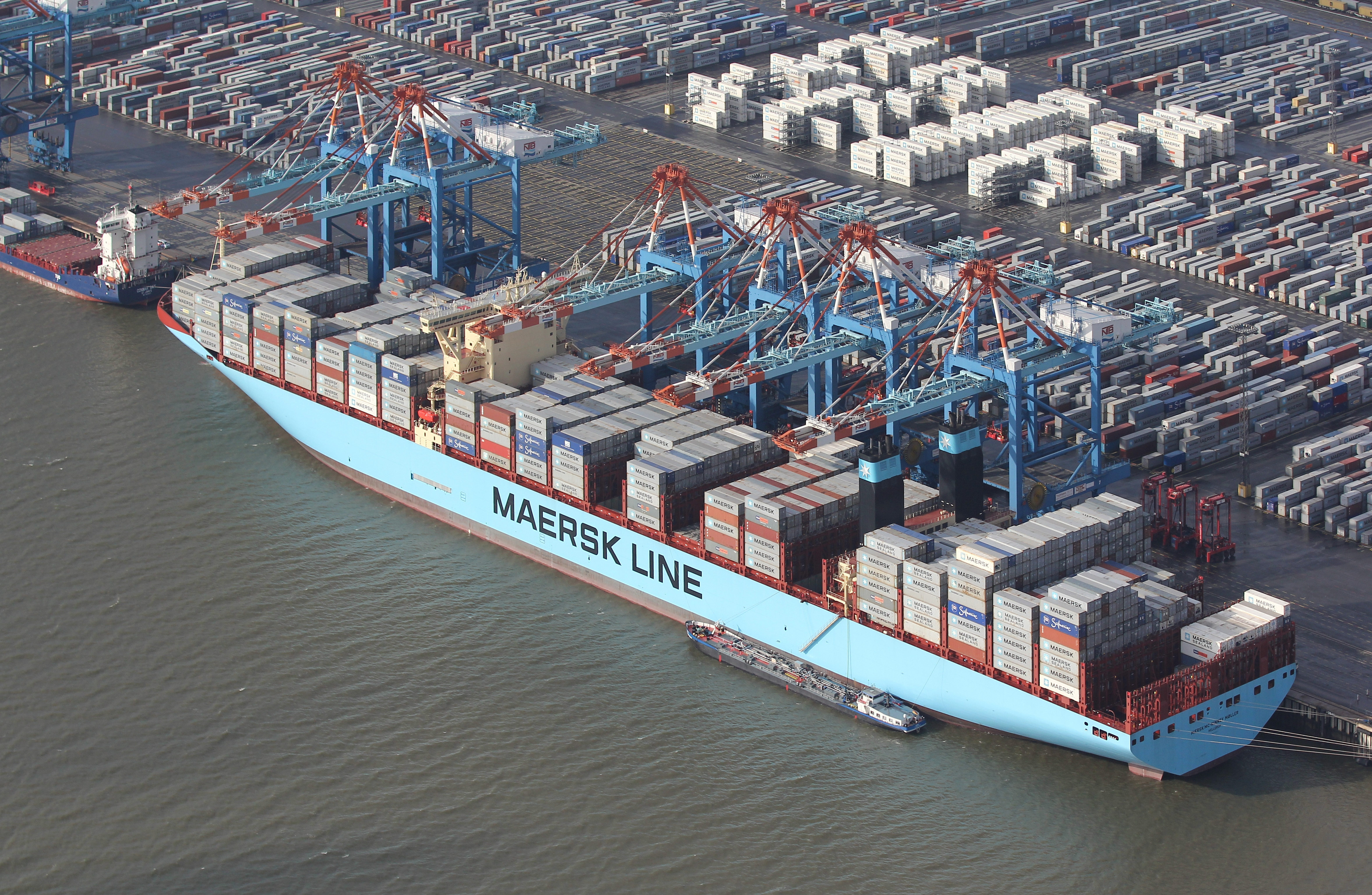 „Maersk Mc Kinney Möller" maiden call Bremerhaven 2013-08-18